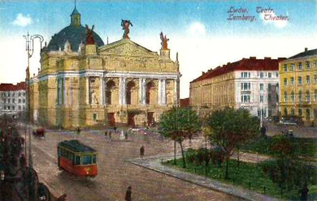 Оперний театр. Львів, 1916.